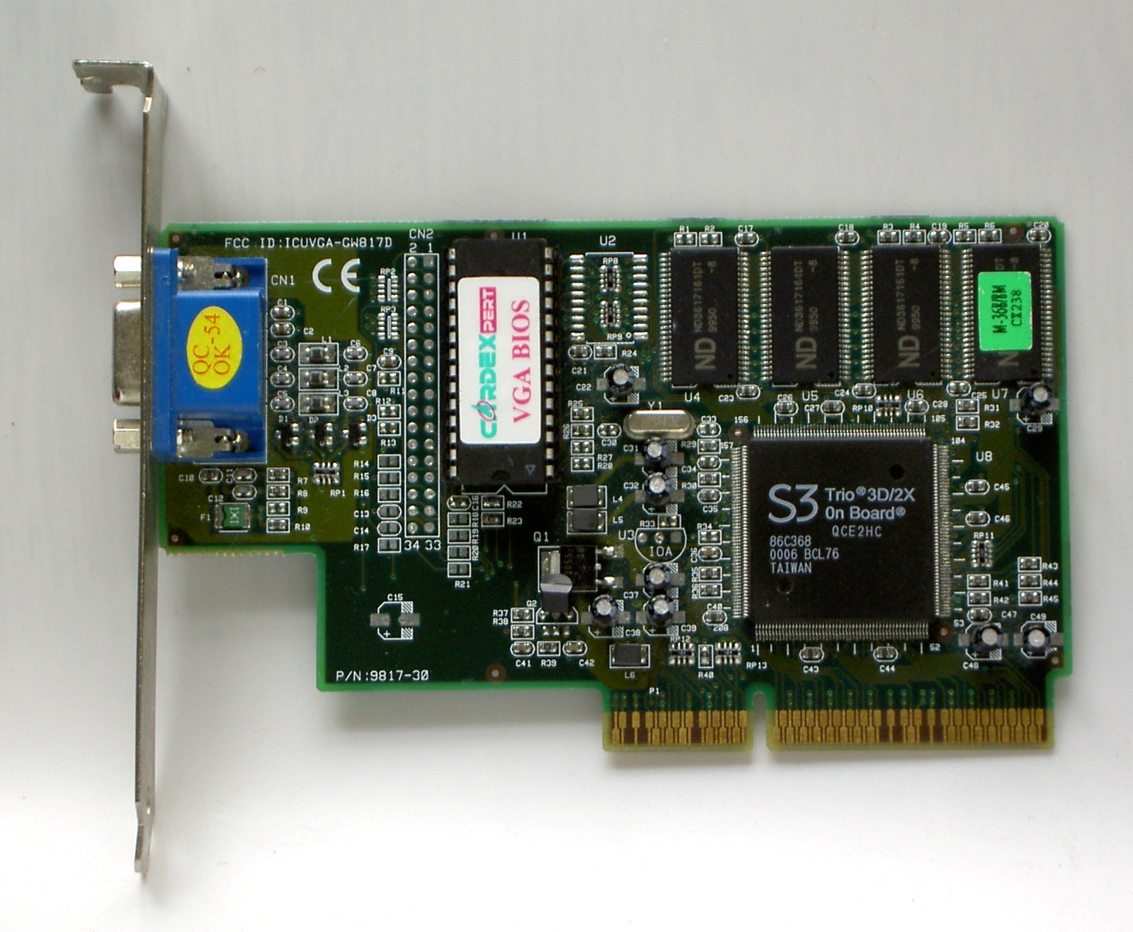 S3 Trio3D 2x VideoCard (Gainword GW817D)